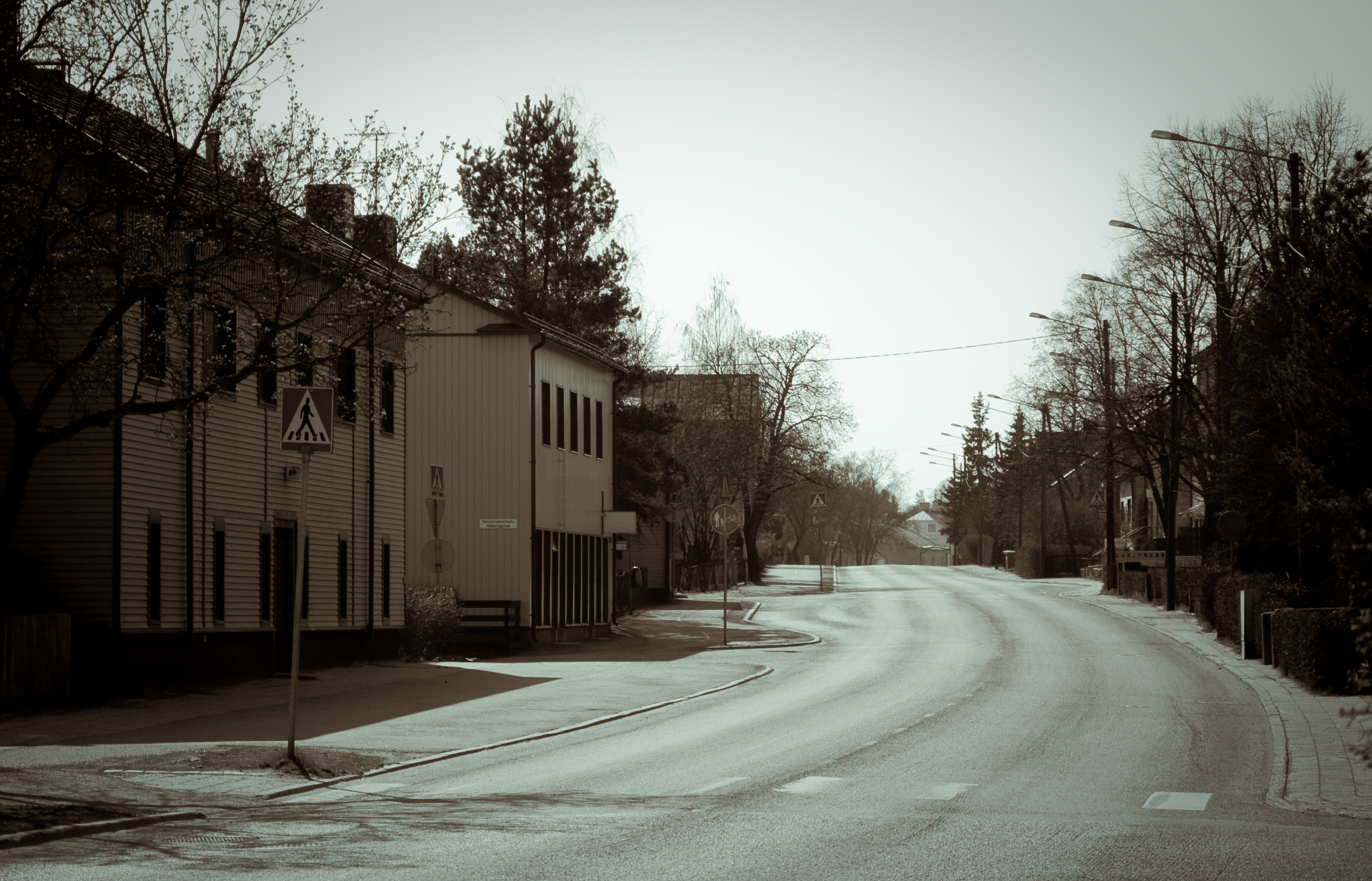 Vanhaa Hämeentietä Savustamonkadun nurkilla. Näissä maisemissa kääntyi joskus raitiovaunu. [1]